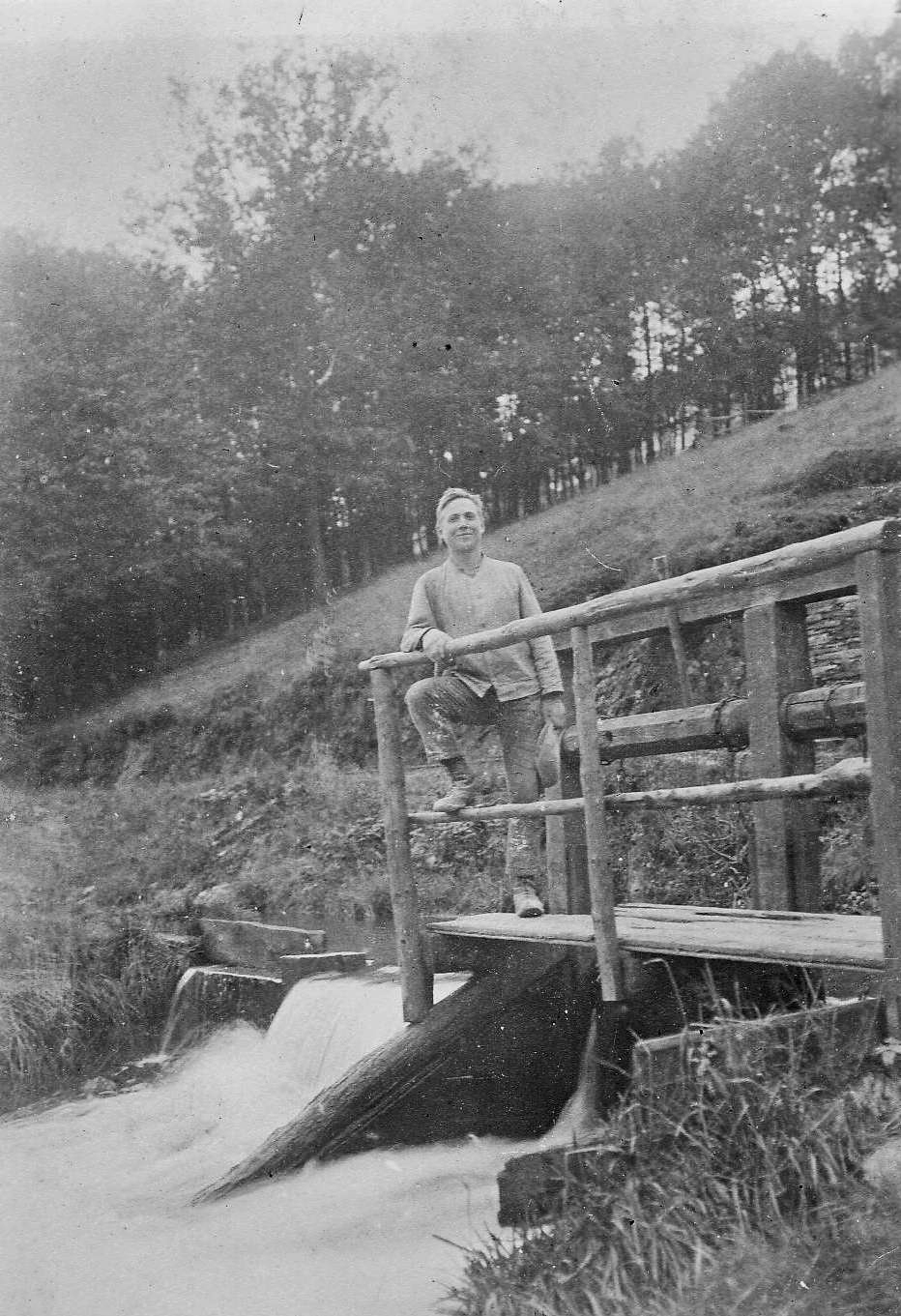 An einem Wehr zur Wiesenbewässerung an der Valme bei Bestwig-Untervalme.